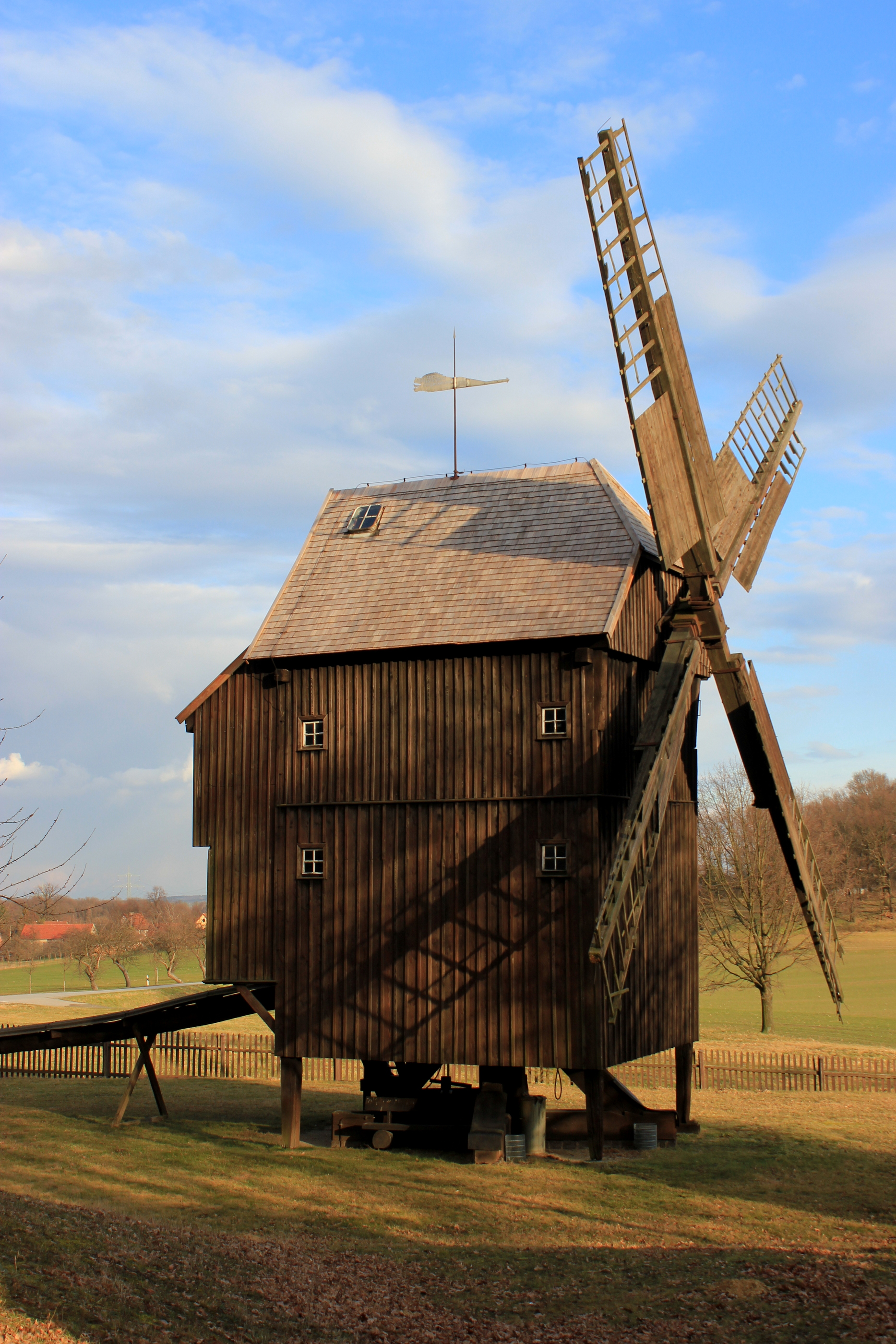 Hornjoserbsce: Stary wětrnik mjez Łuhom a Chasowom.